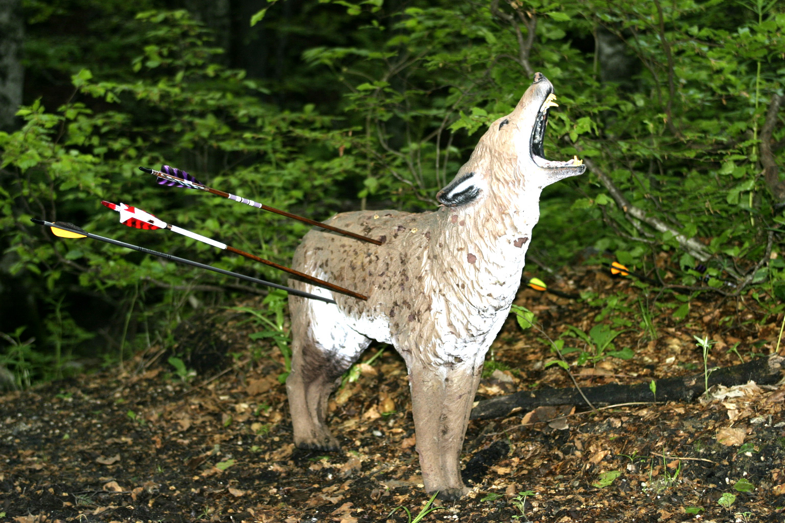 3D Jagdattrappe (Kojote)